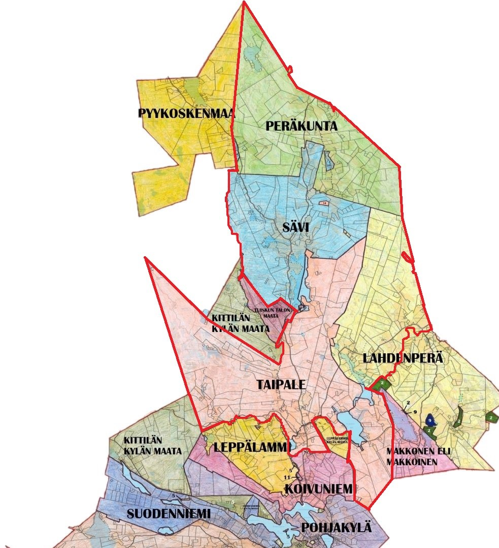 Märkätaipaleen kylän alue Suodenniemellä